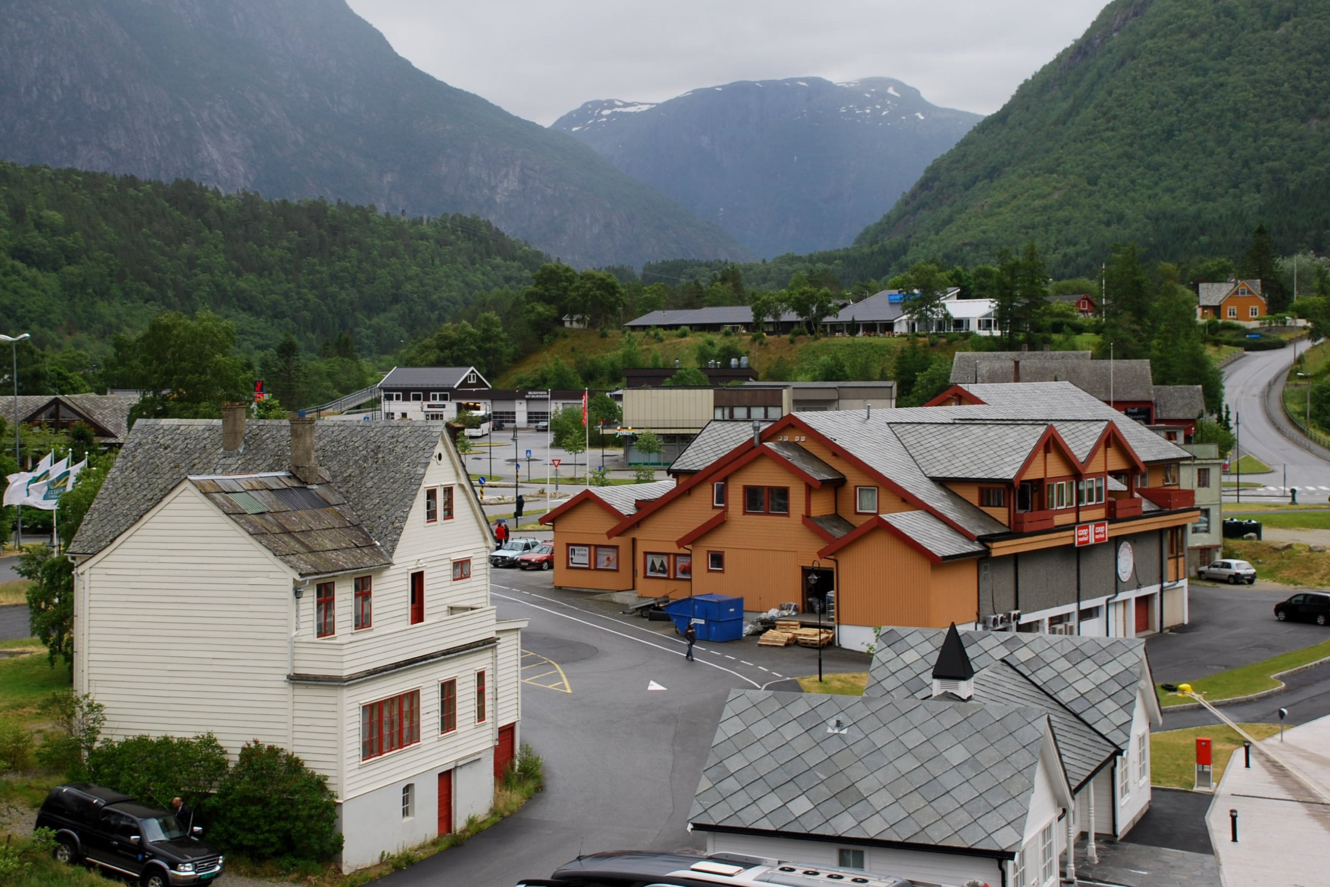 Eidfjord, un pequeño pueblo de Noruega.